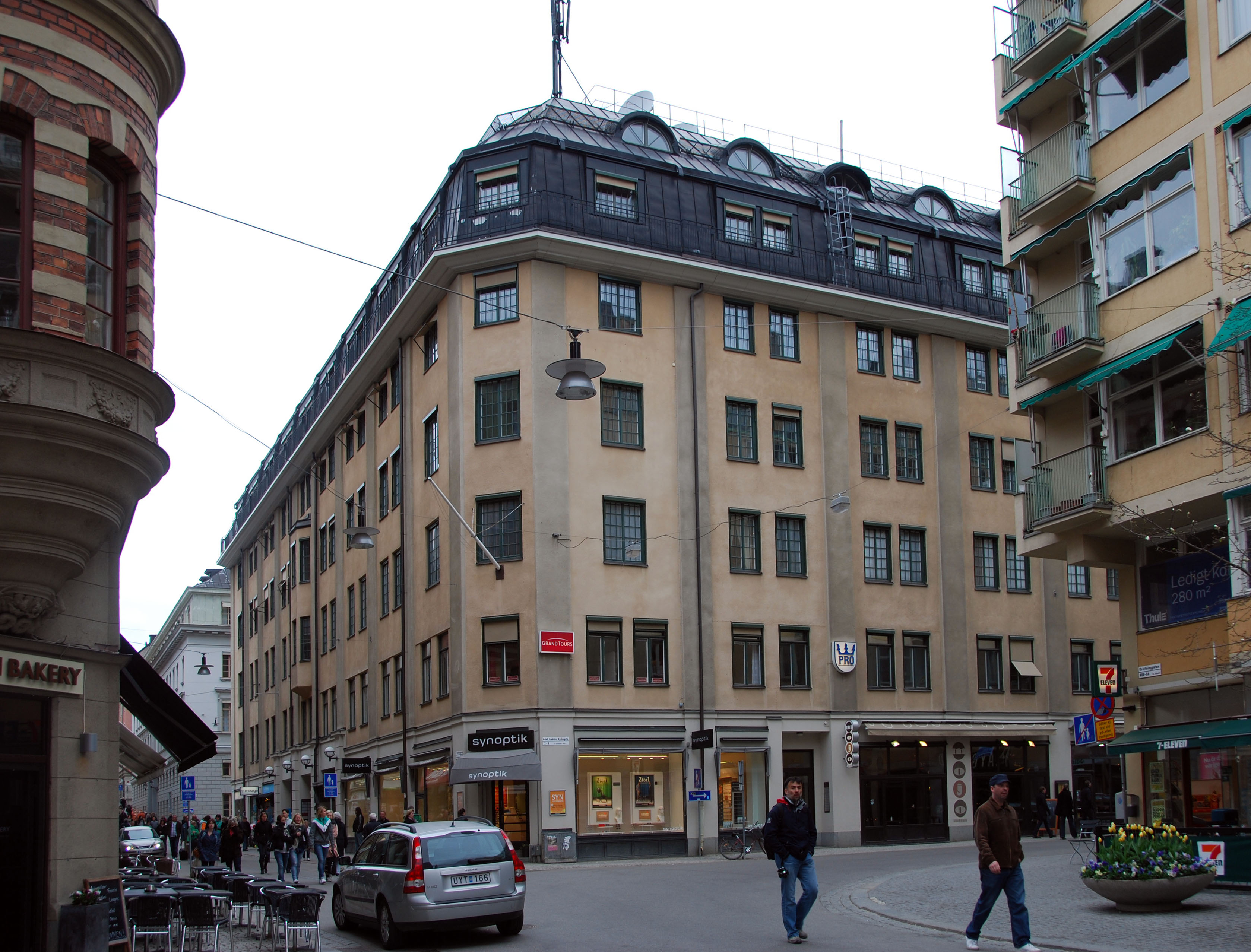 Adolf Fredriks Kyrkogata 12, Stockholm